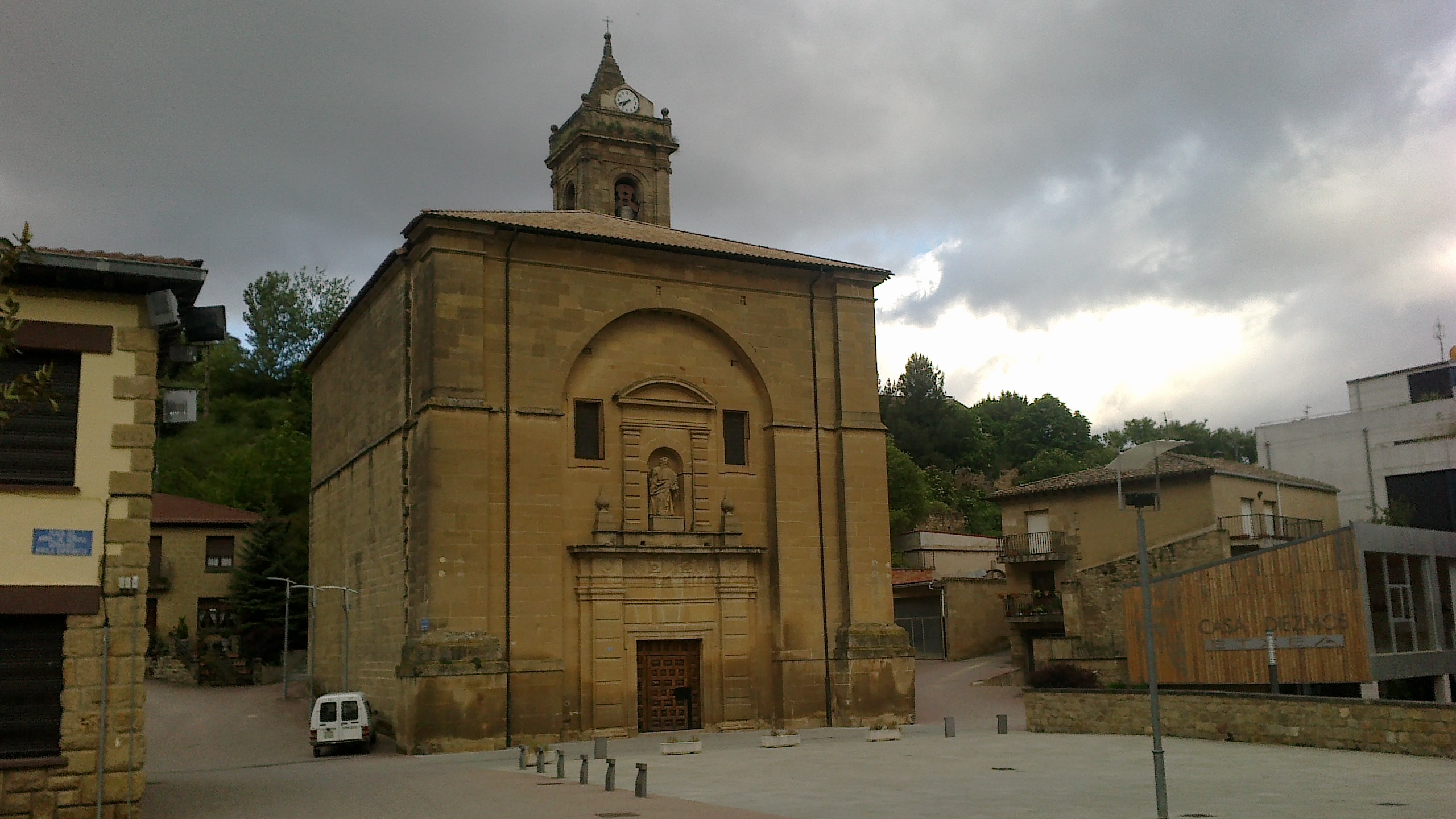 San Andres eliza, Villabuena Araba